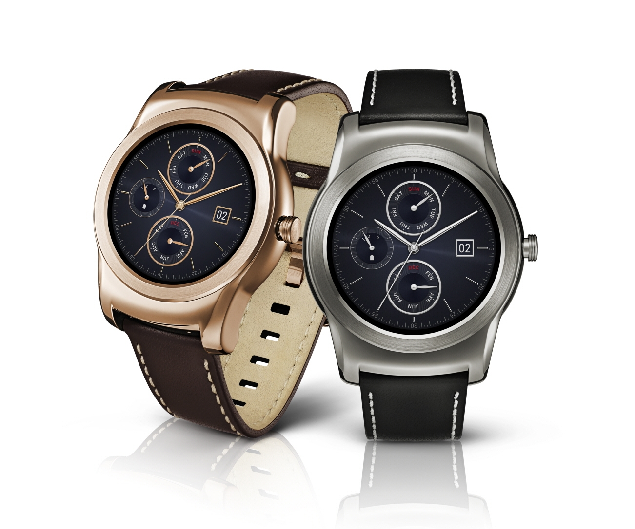 LG전자, ‘LG 워치 어베인(Urbane)’ MWC 2015서 첫 공개 ■ 고급스러운 느낌의 클래식한 원형 디자인 □ 전작 ‘LG G워치R’ 대비 크기, 두께 감소한 세련된 외관 □ 스크래치, 부식에 강한 메탈 바디…골드, 실버 2가지 색상 □ 스티치(바느질 방식) 마감 처리한 천연 가죽 스트랩 ■ 최신 안드로이드 웨어 버전 운영체제 탑재 ※ Social LG전자 ( 에서 관련 보도자료를 확인하실 수 있습니다.